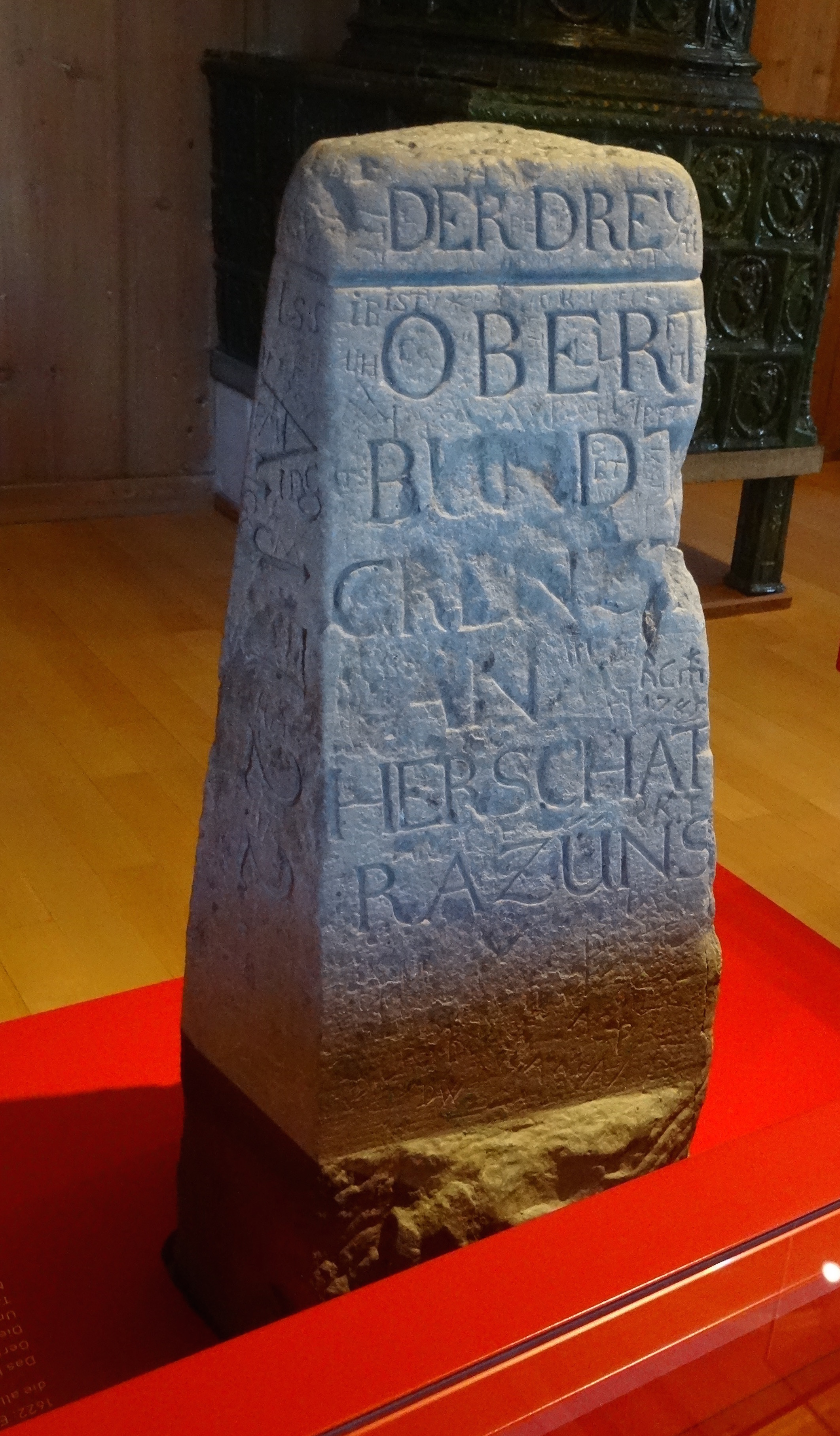 Dreibündenstein von 1722, Höhe ca. 1.1 m